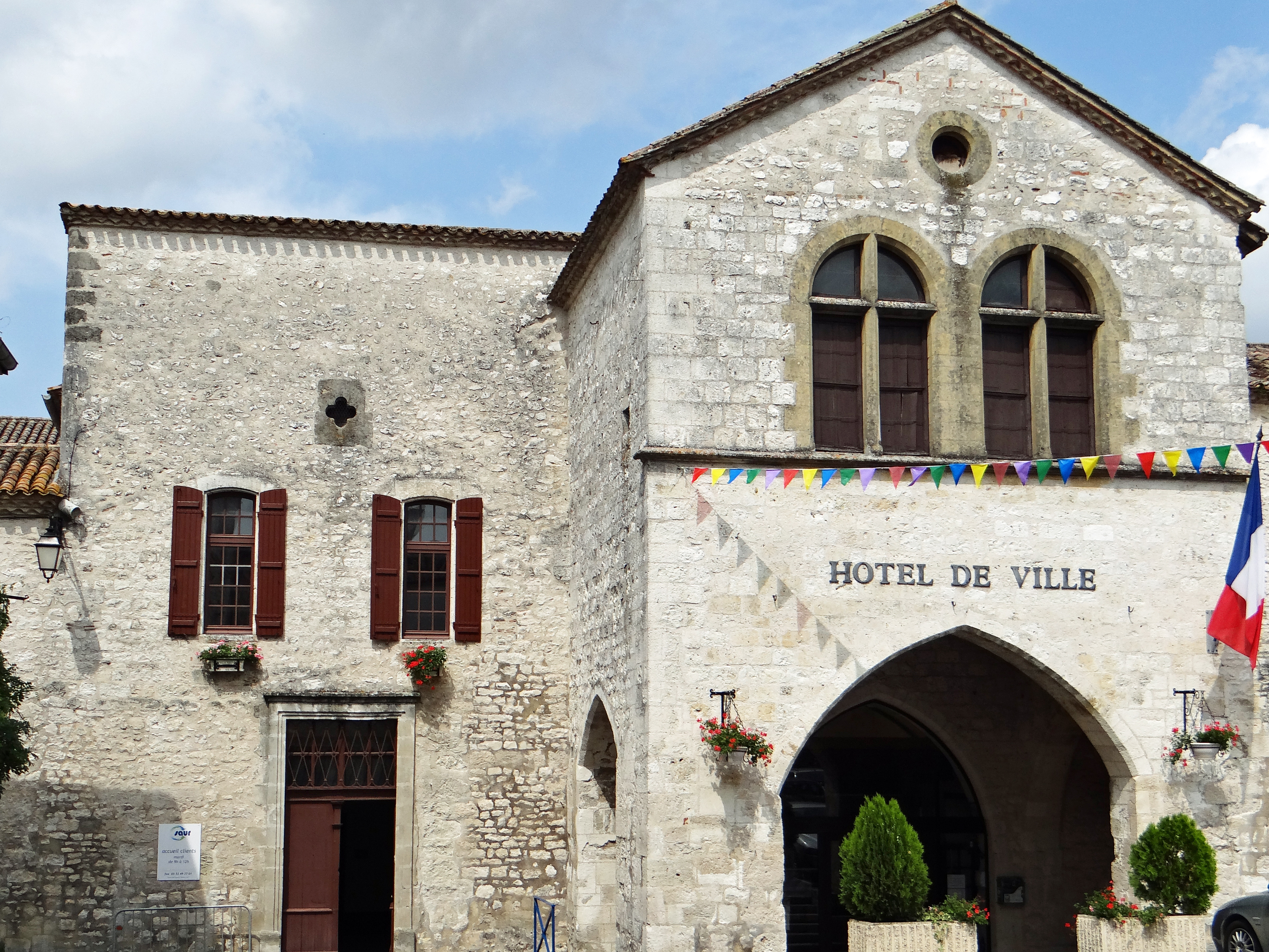 Castillonnès - Hôtel de ville